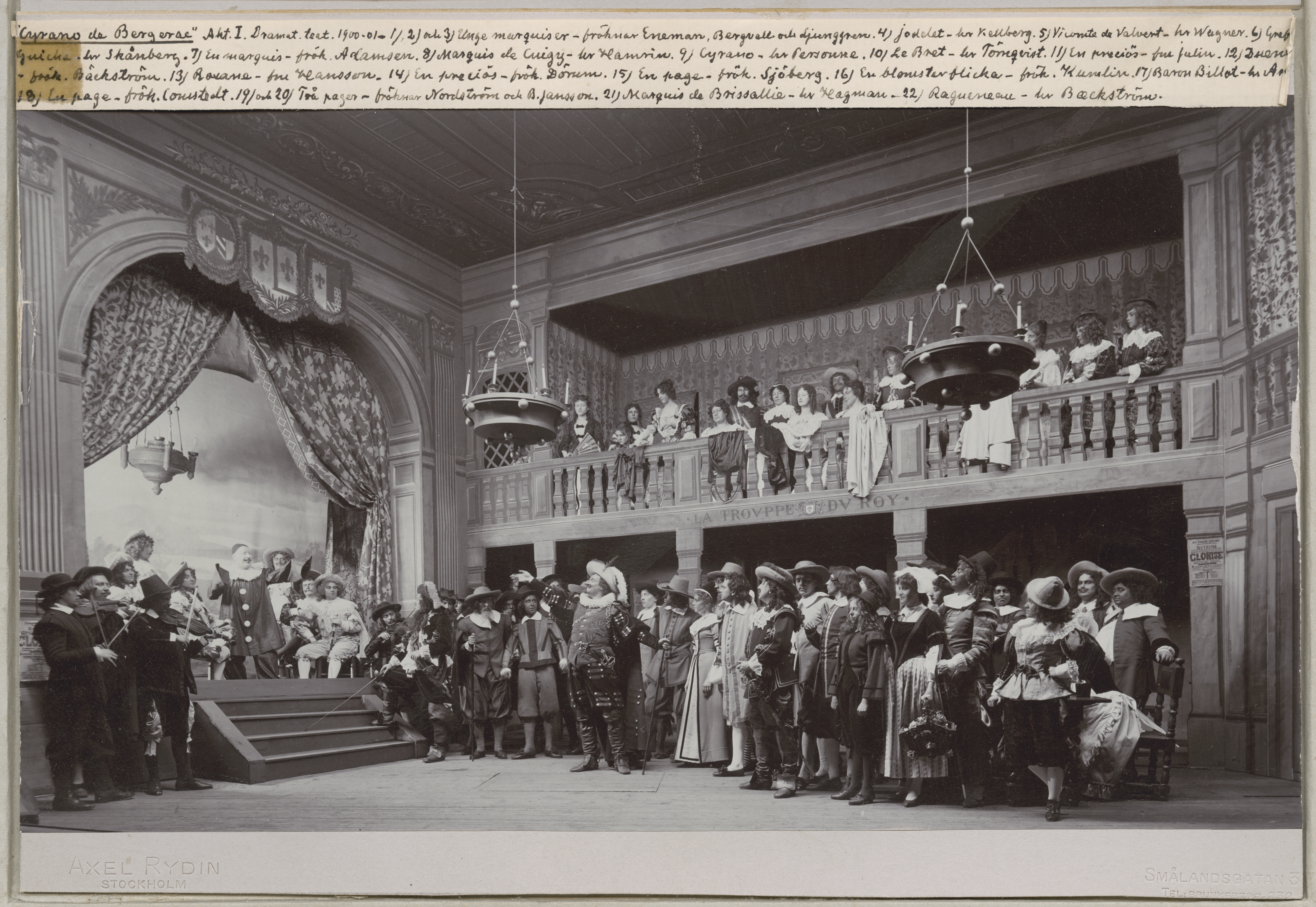 Cyrano de Bergerac. Act 1. Dramaten, Stockholm. Louise Eneman, Hermine Bergvall & Maja Ljunggren som unga marquiser, Karl Kellberg som Jodelet, Erland Wagner som Vicomte de Valvert, Georg Skånberg som Greve Antoine de Guiche, Anna Greta Adamsen som En marquis, Ossian Hamrin som Marquis de Cuigy, Nils Personne som Cyrano, Georg Törnqvist som Henri Le Bret, fru Julin som En preciös, Georgina Bäckström som Duennan, Valborg Hansson som Roxane, Tyra Dörum som En preciös, Constance Sjöberg som En page, Frida Kumlin som En blomsterflicka, Nils Arehn som Baron Hillot, Anna Comstedt som En page, fröken Nordström som En page, Betty Jansson som En page, Justus Hagman som Marquis de Brissallie & Oscar Baeckström som Ragueneau.